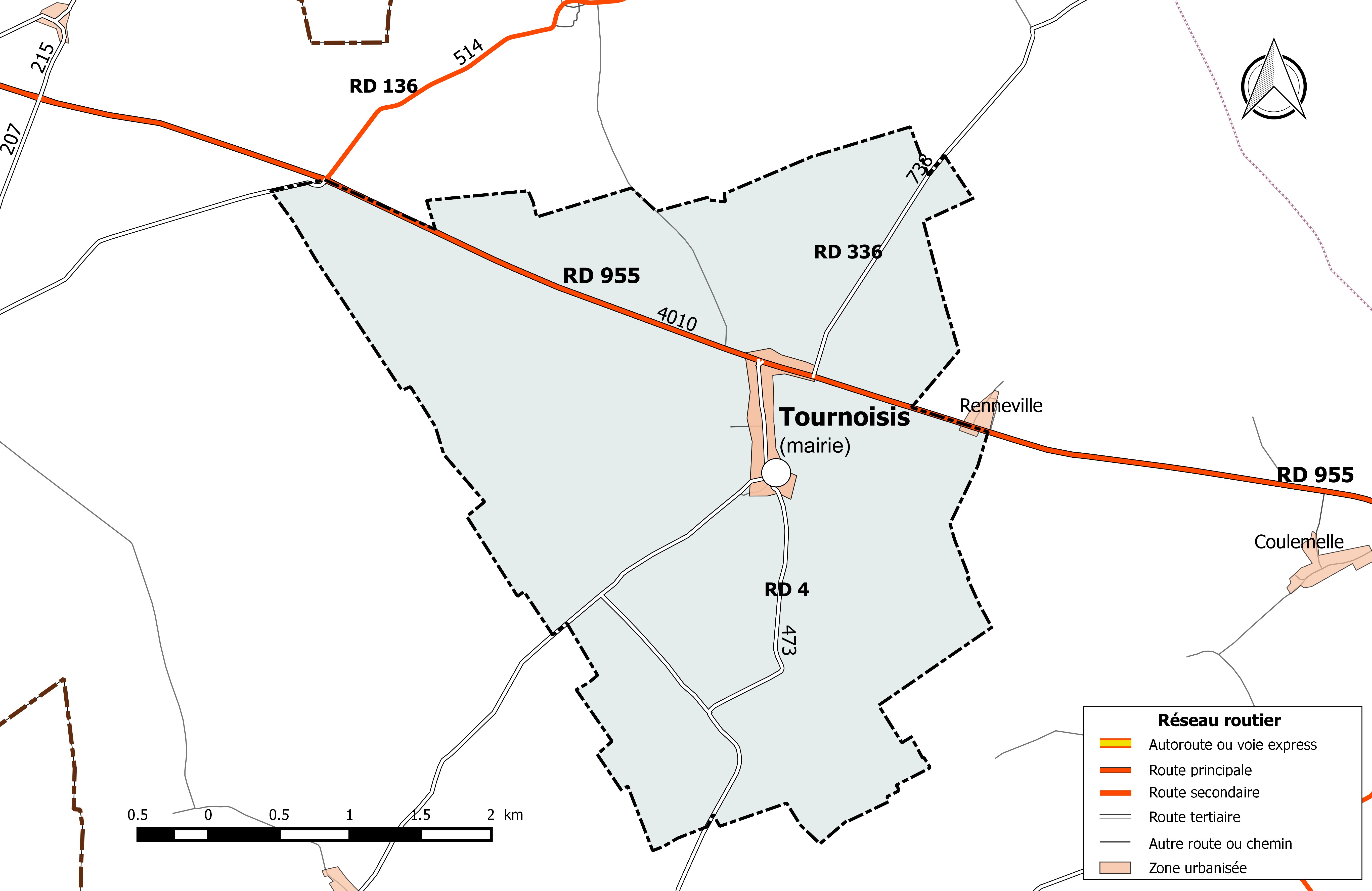 Carte du réseau routier de la commune de Tournoisis.